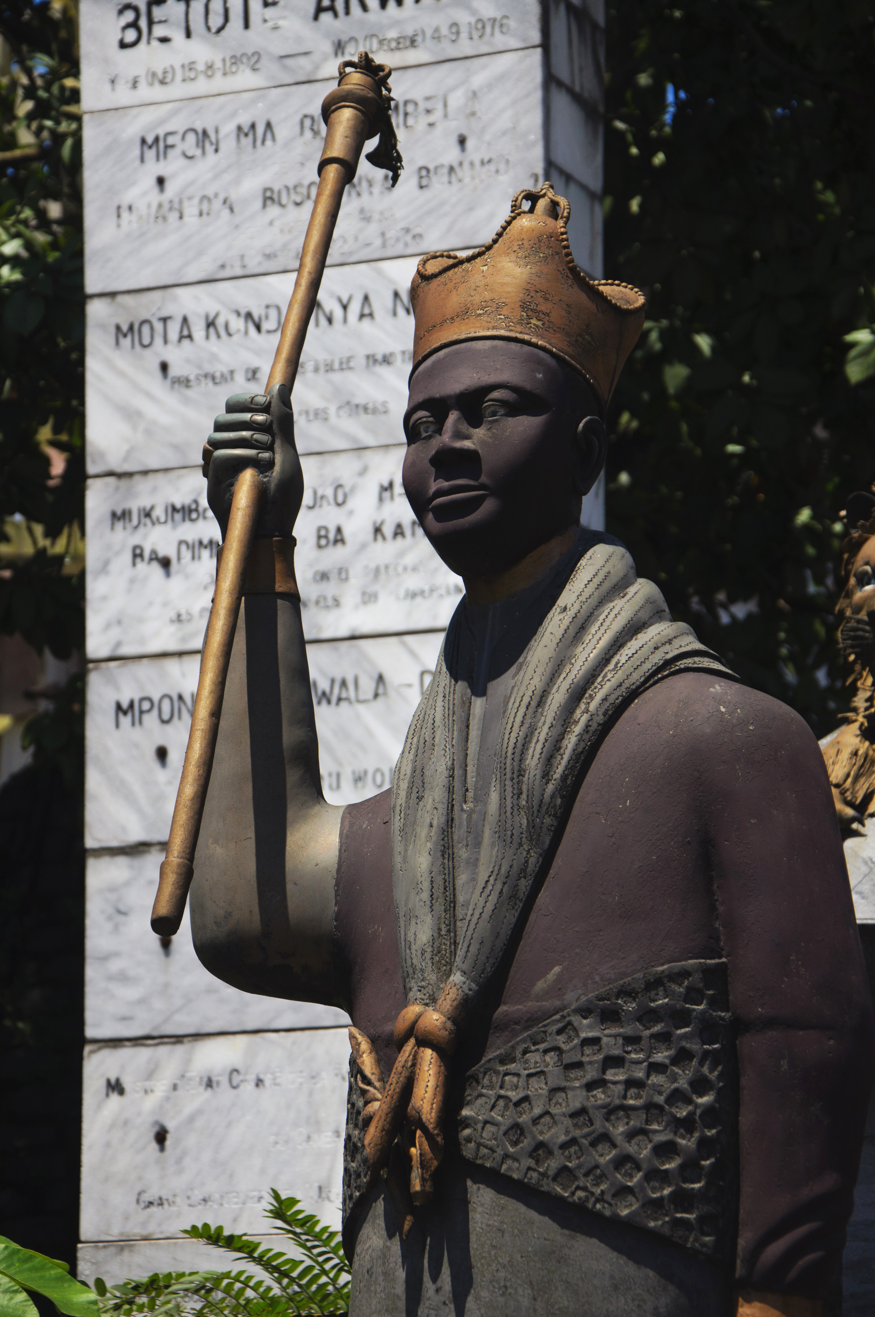 Monument des roi d'akwa Douala Akwa